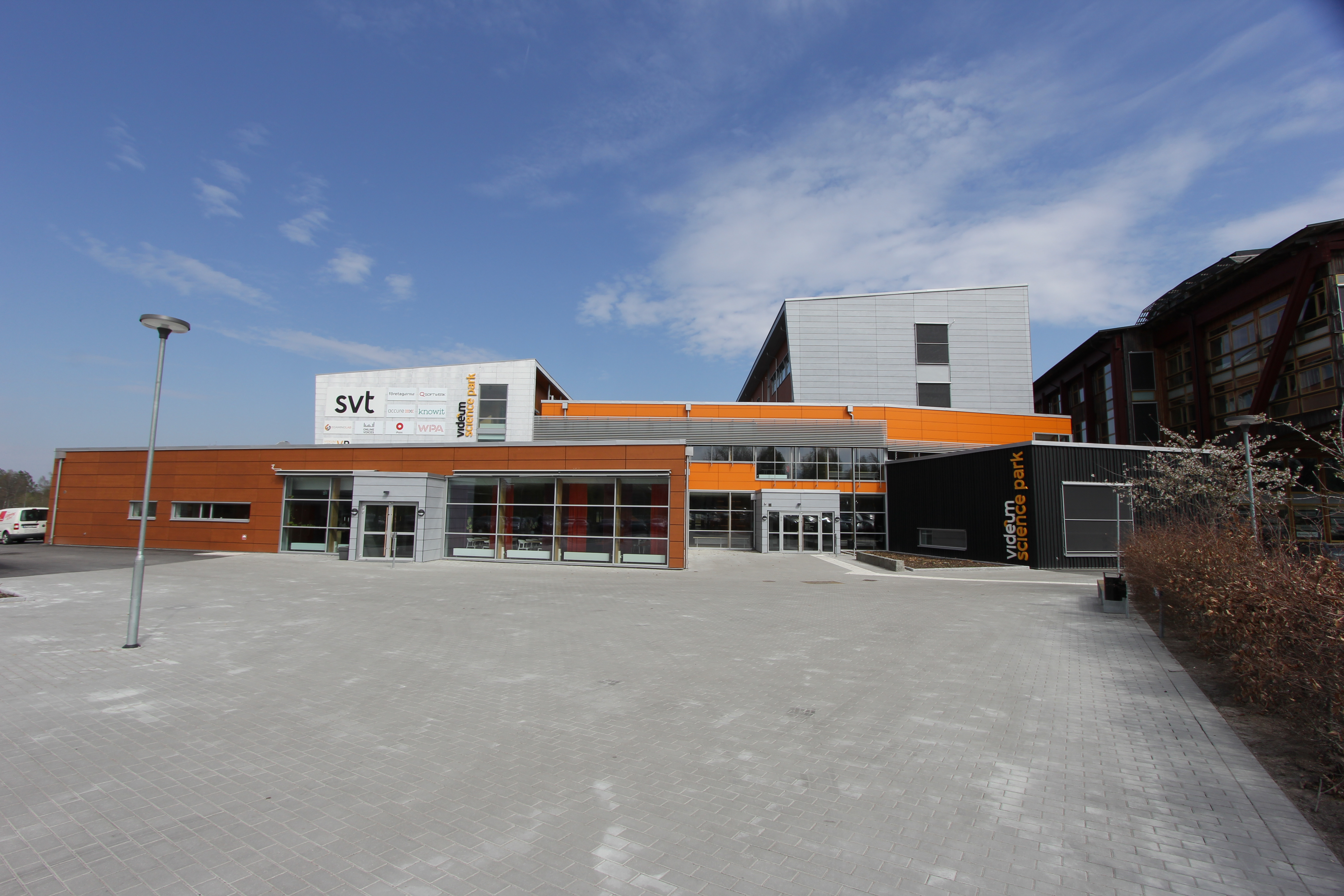 Videum Science Park, Växjö 2019